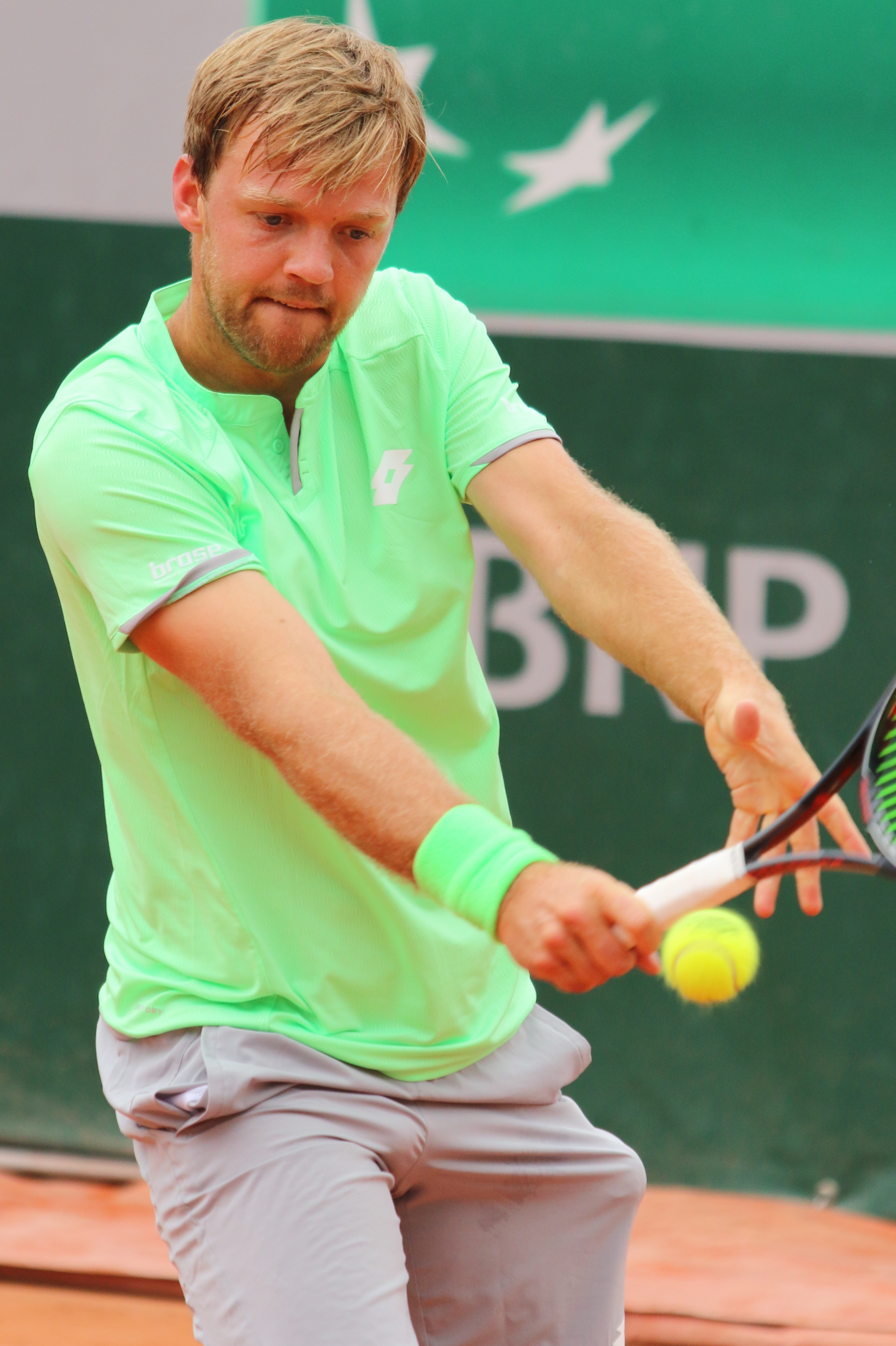 Krawietz RGQ19 (17)